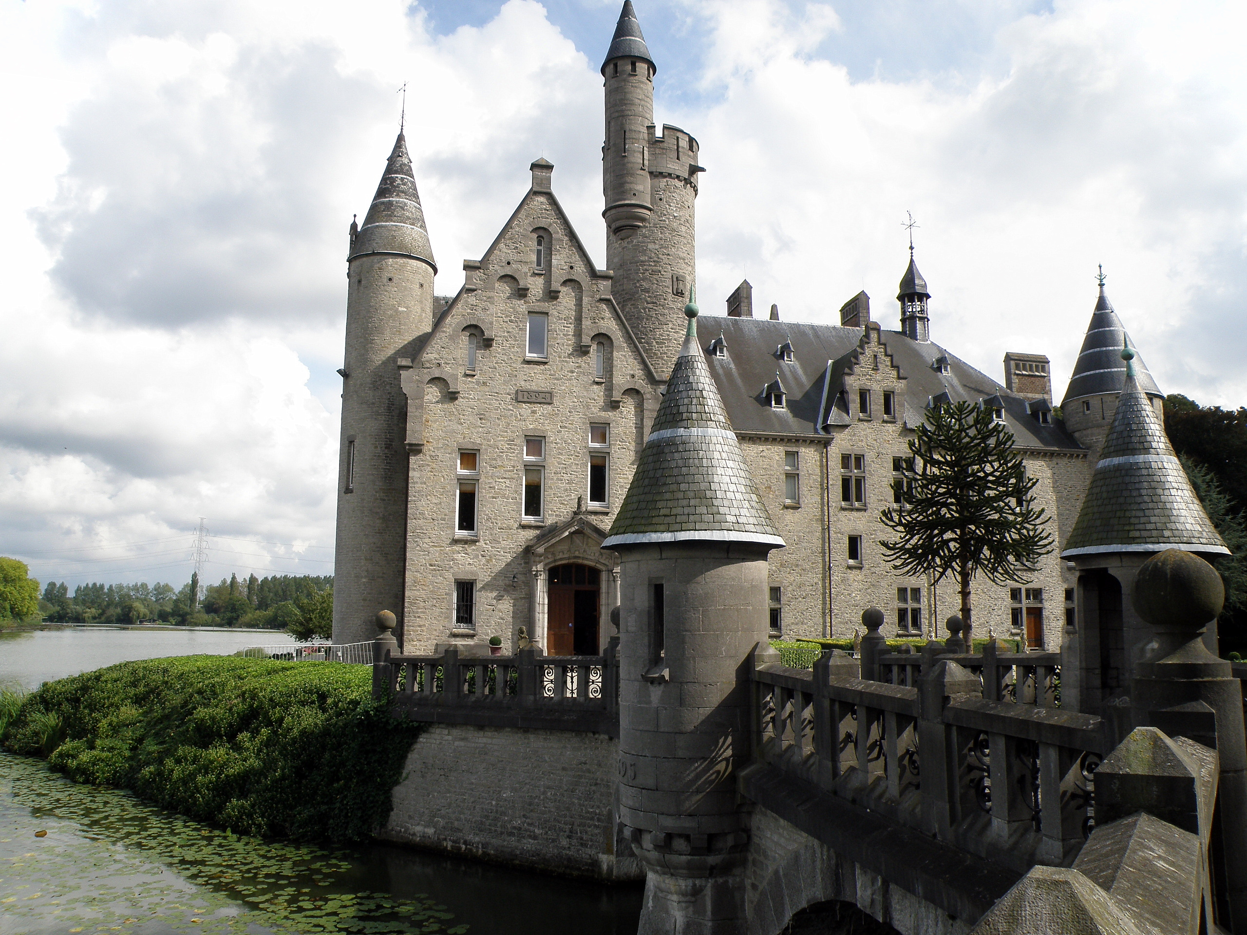 Commune de Bornem, prov. d’Anvers, Belgique. Le Château Marnix de Sainte-Aldegonde (ou château de Marnix de Sainte-Aldegonde, ou simplement château de Bornem), édifié fin XIXe selon des plans d’Henri Beyaert, sis non loin du village de Weert (comm. de Bornem). Aile ouest et pont d'accès (tourelles à l'avant-plan). À l'arrière-plan à gauche, Vieil Escaut (bras mort de l'Escaut, en néerl. Oude Schelde).